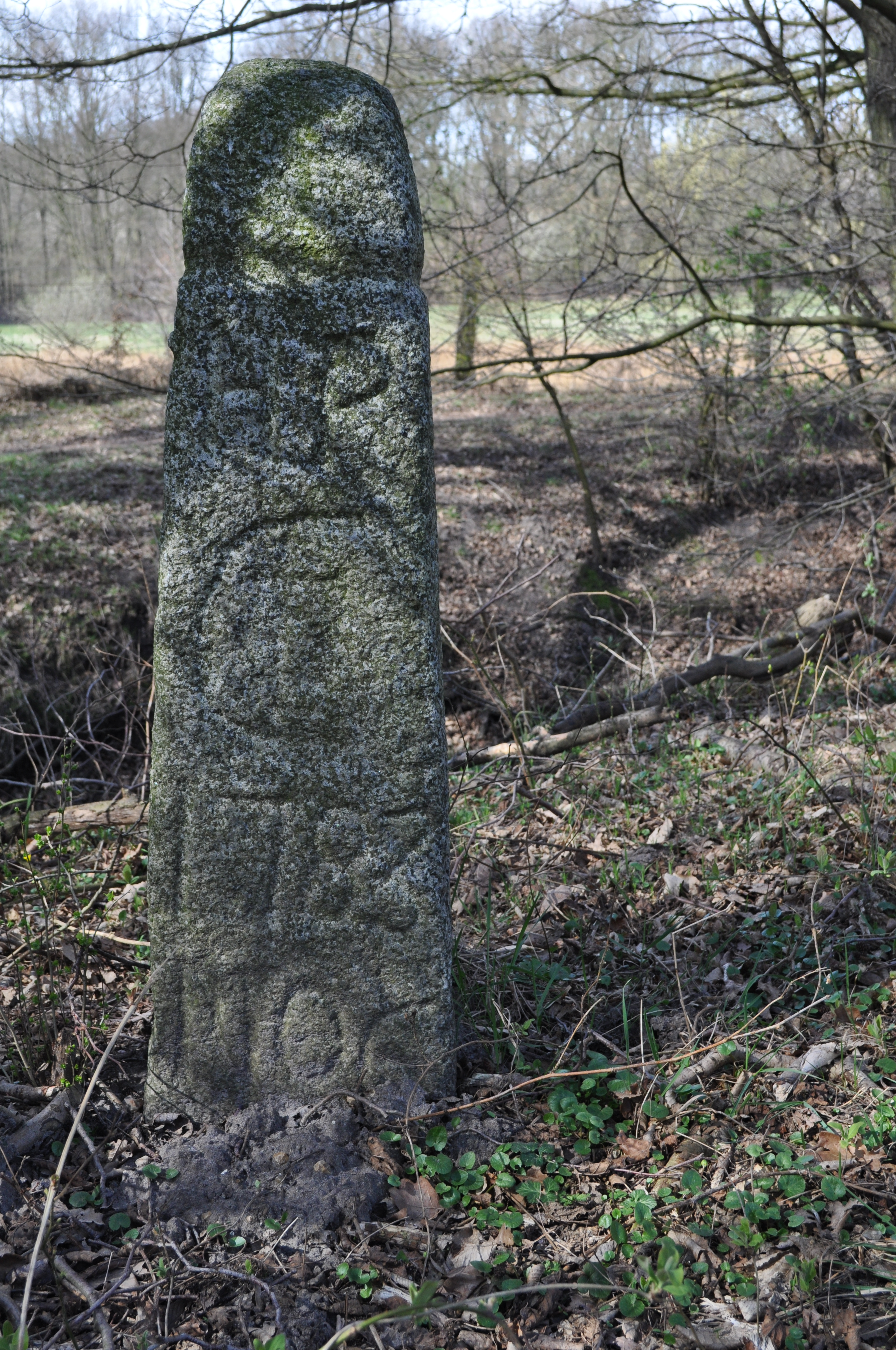 Grenzstein Nr. 6 des ehemals zur Herrschaft Pinneberg gehörenden Dorfes Hummelsbüttel an der heutigen Grenze der Hamburger Stadtteile Hummelsbüttel und LangenhornInschrift: HP / C7 / 1783 / No 6 (Herrschaft Pinneberg / Christian VII. / gesetzt 1783 / Grenzstein Nr. 6)